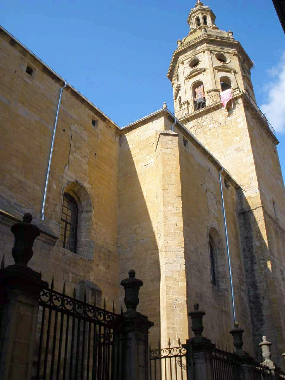 Iglesia de Santiago, Puente la Reina (Navarra)